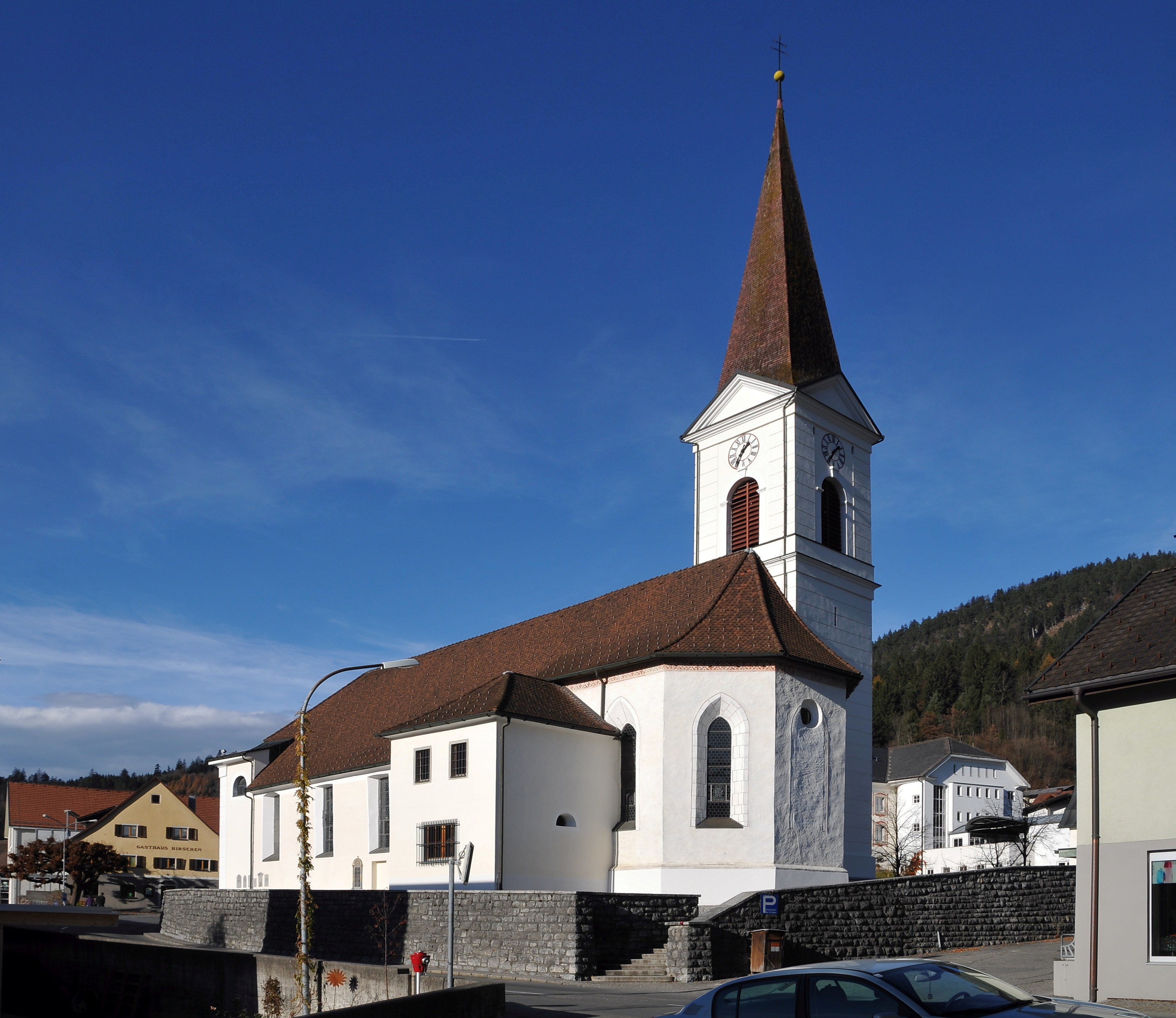 Kath. Pfarrkirche hll. Viktor und Markus mit Friedhof an der Waldburgstraße 1a und 1b in Nüziders.